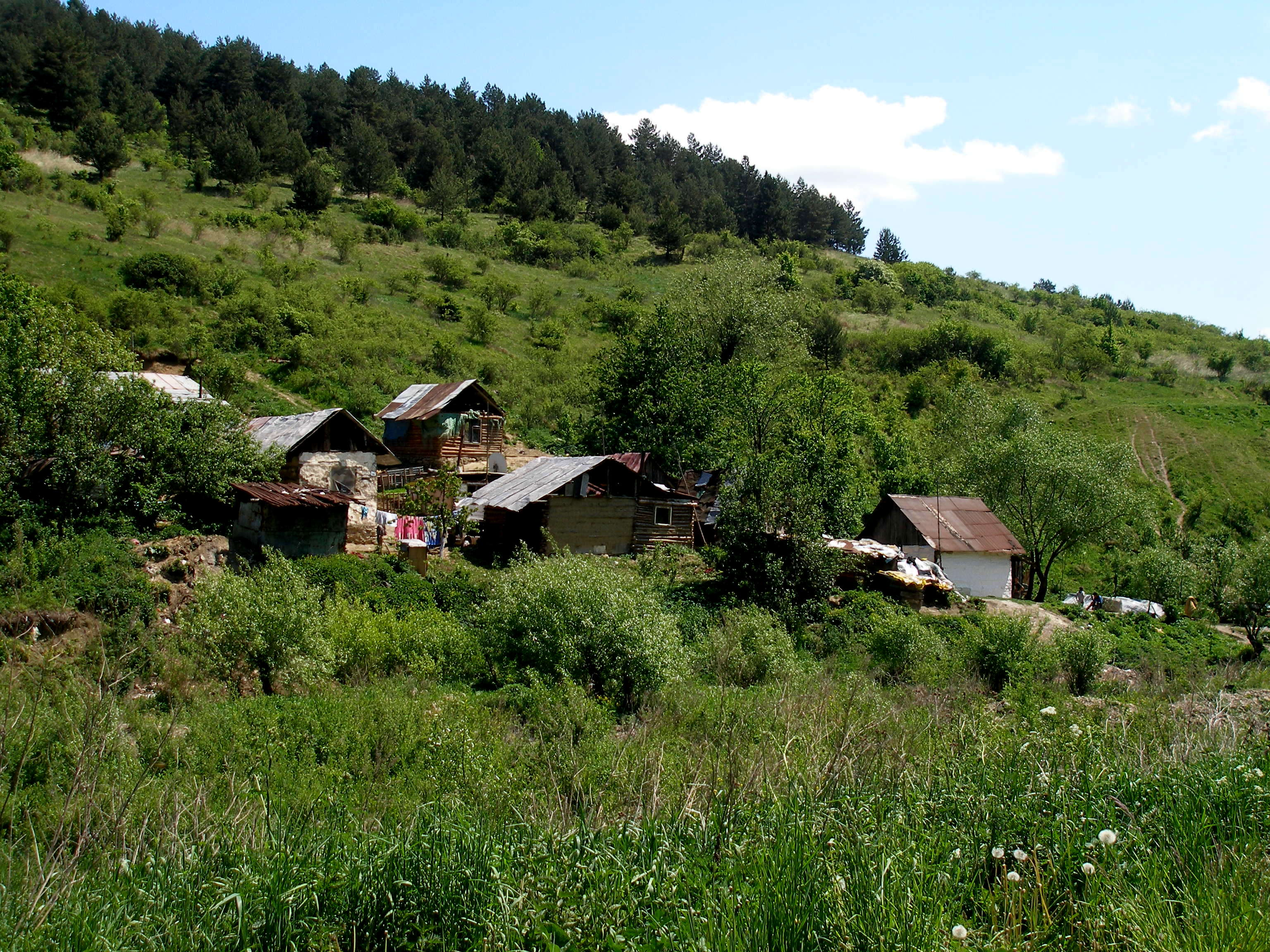 Obec Milpoš okres Sabinov. Rómska osada.